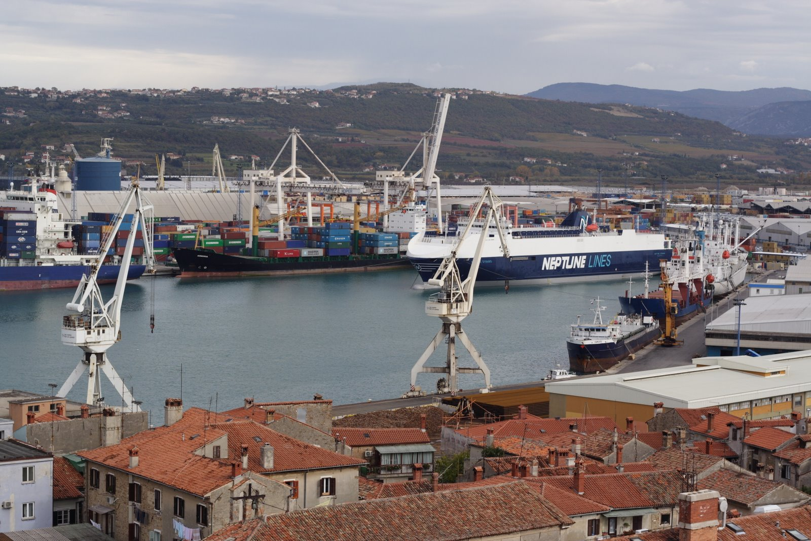 Koper